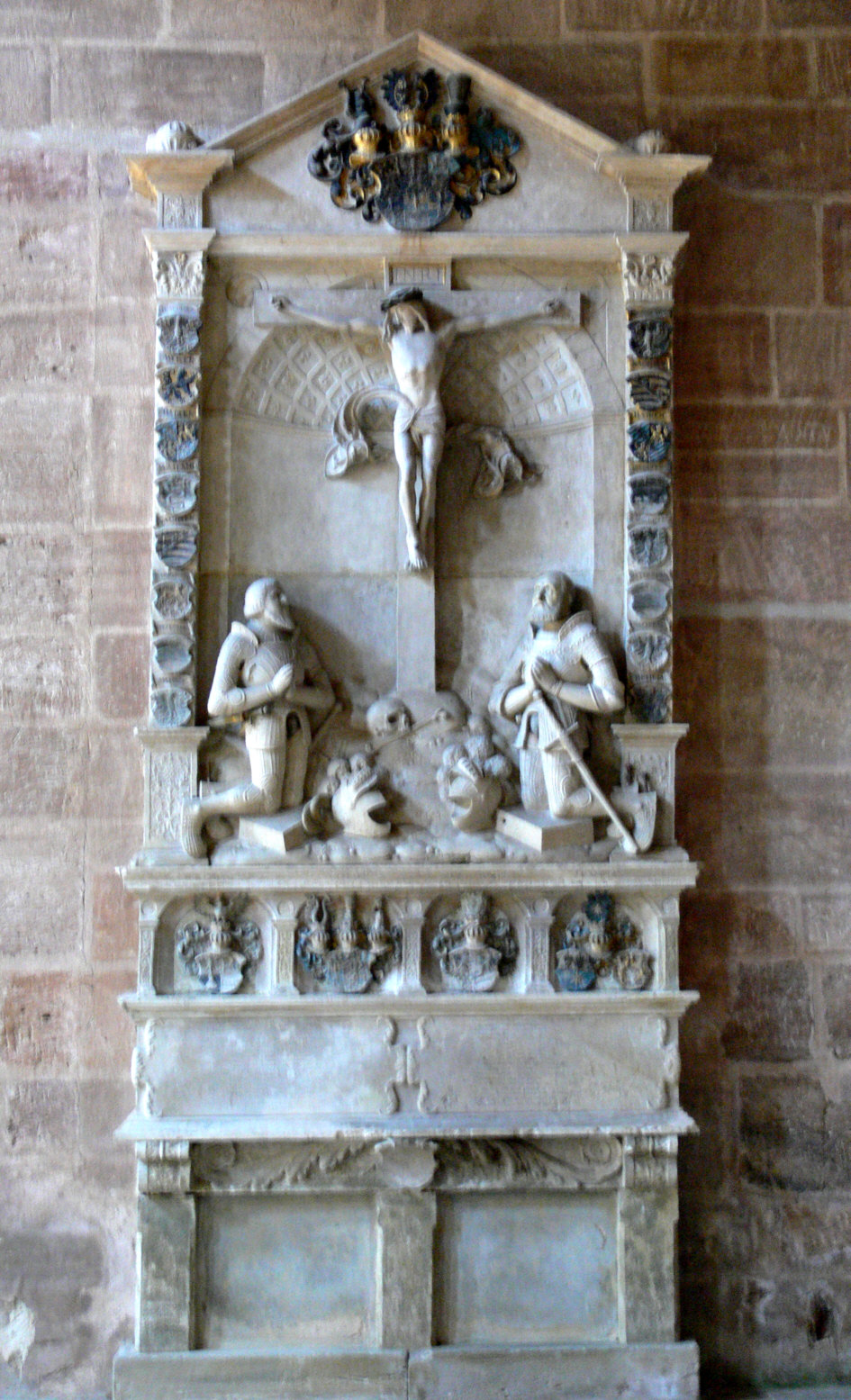 Heilsbronn, Landkreis Ansbach, Münster St. Marien und Jakobus Epitaph des Markgrafen Georgs des Frommen († 1543) und seines Vaters Friedrich d. Ä. († 1536), geschafften 1538 von Loy Hering